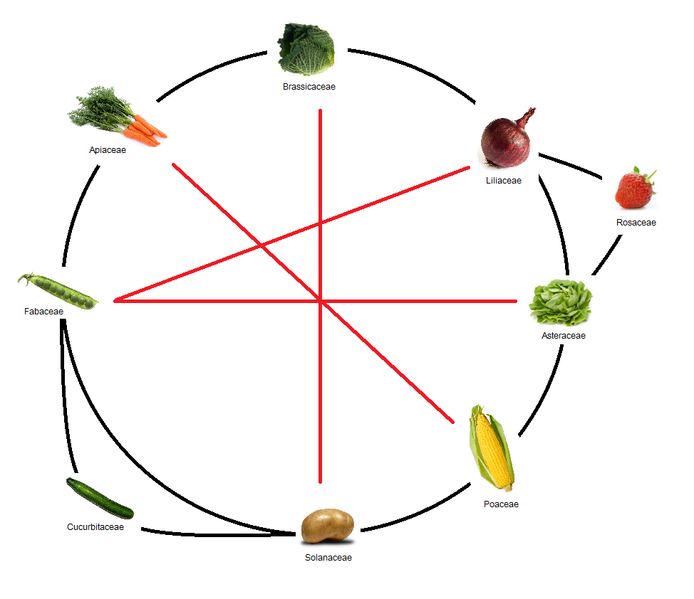 Jó és rossz szomszédságok a vetésforgóban, a vetésváltásban és a növénytársításban. A fekete vonallal jelölt társulások hasznosak, a pirossal jelöltek károsak. Minél közelebb vannak a növénycsaládok egymáshoz, annál jobban összeillenek.